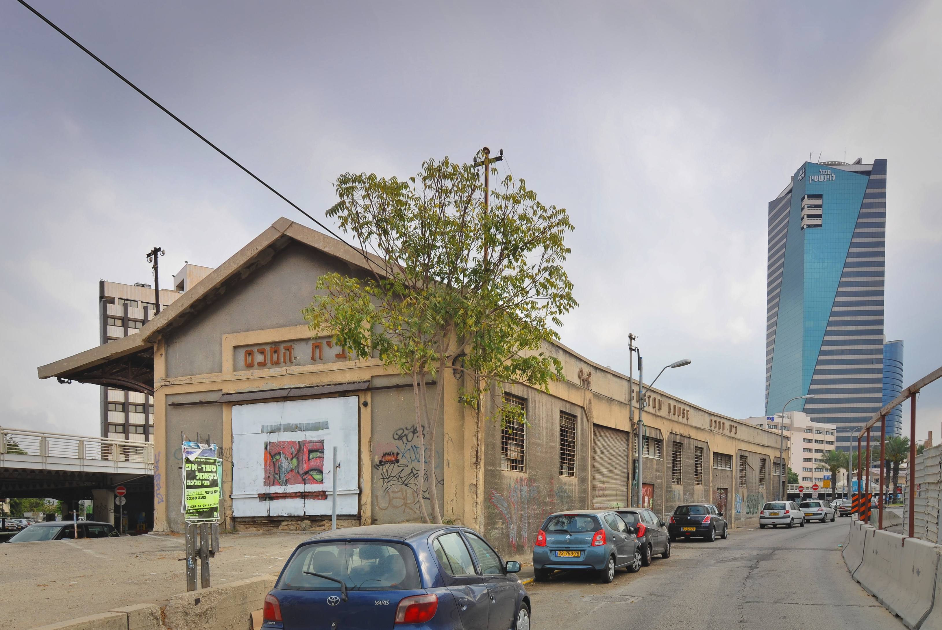 בית המכס הבריטי ברחוב הרכבת